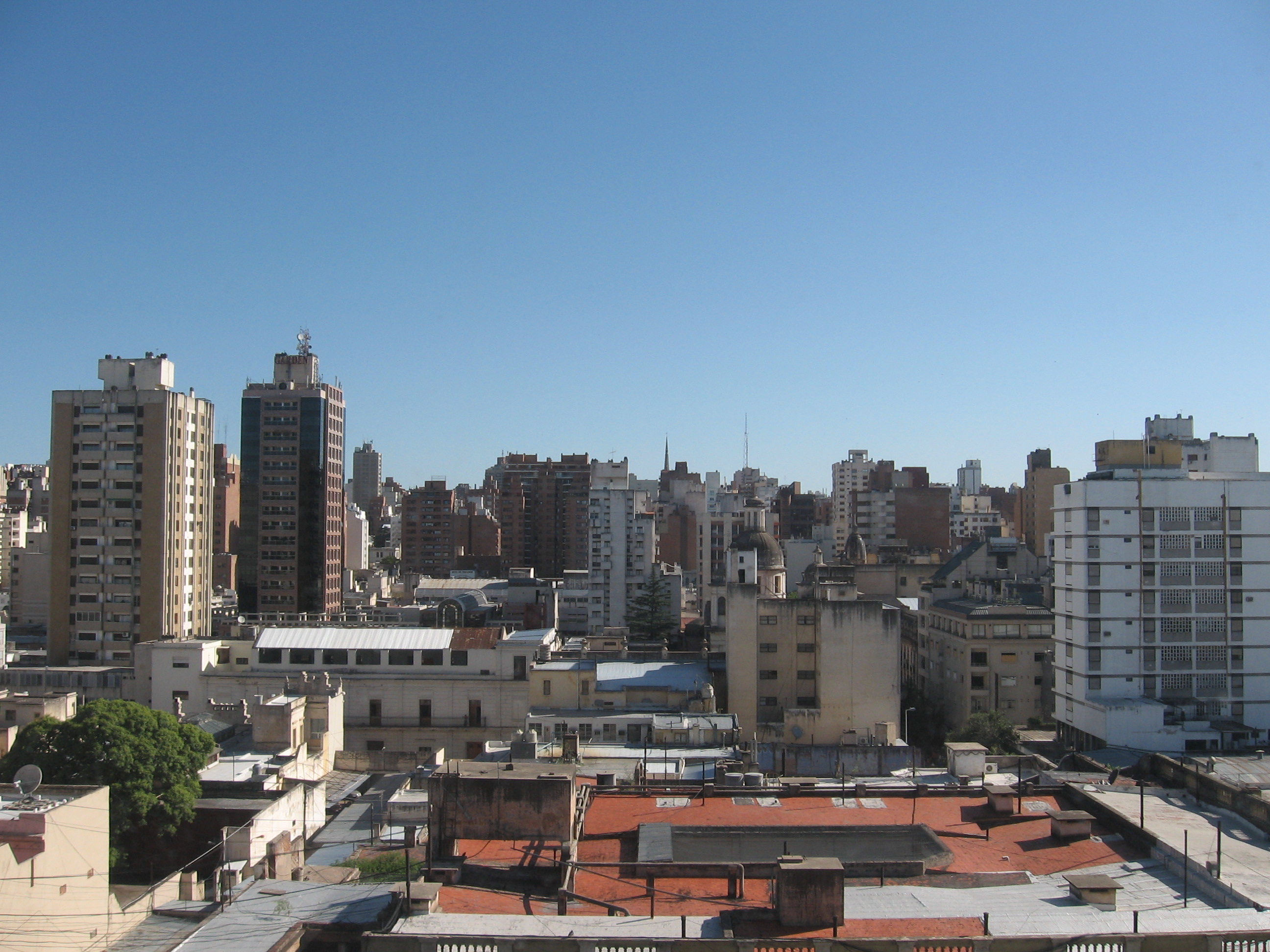 Ciudad de Córdoba, argentina, vista desde lo alto. Foto tomada desde el hotel Susex